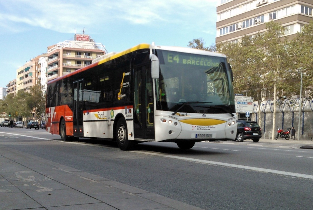 Autobús interurbà/urba a Barcelona